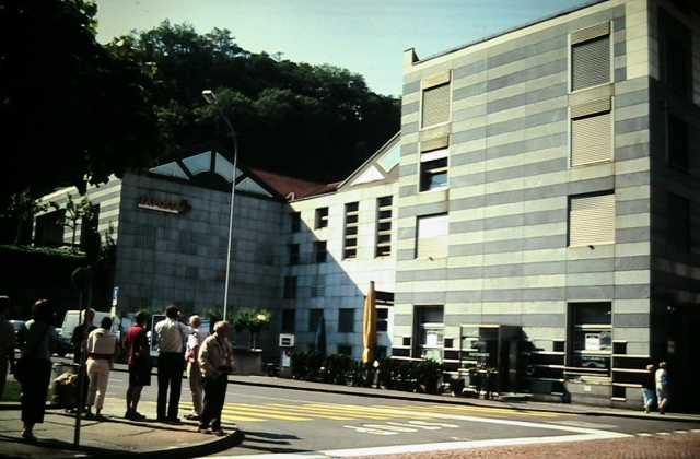 Fotis: Ella Strug, 19-24/5/2005. Donis permeson por kopii la diapozitivon por publikigo en Vikipedio al Biciklanto